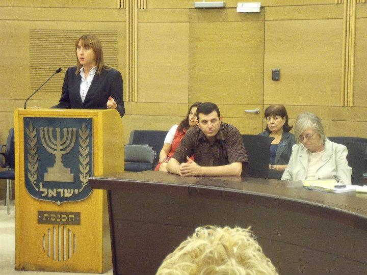 Knesset Member, Orit Zuaretz